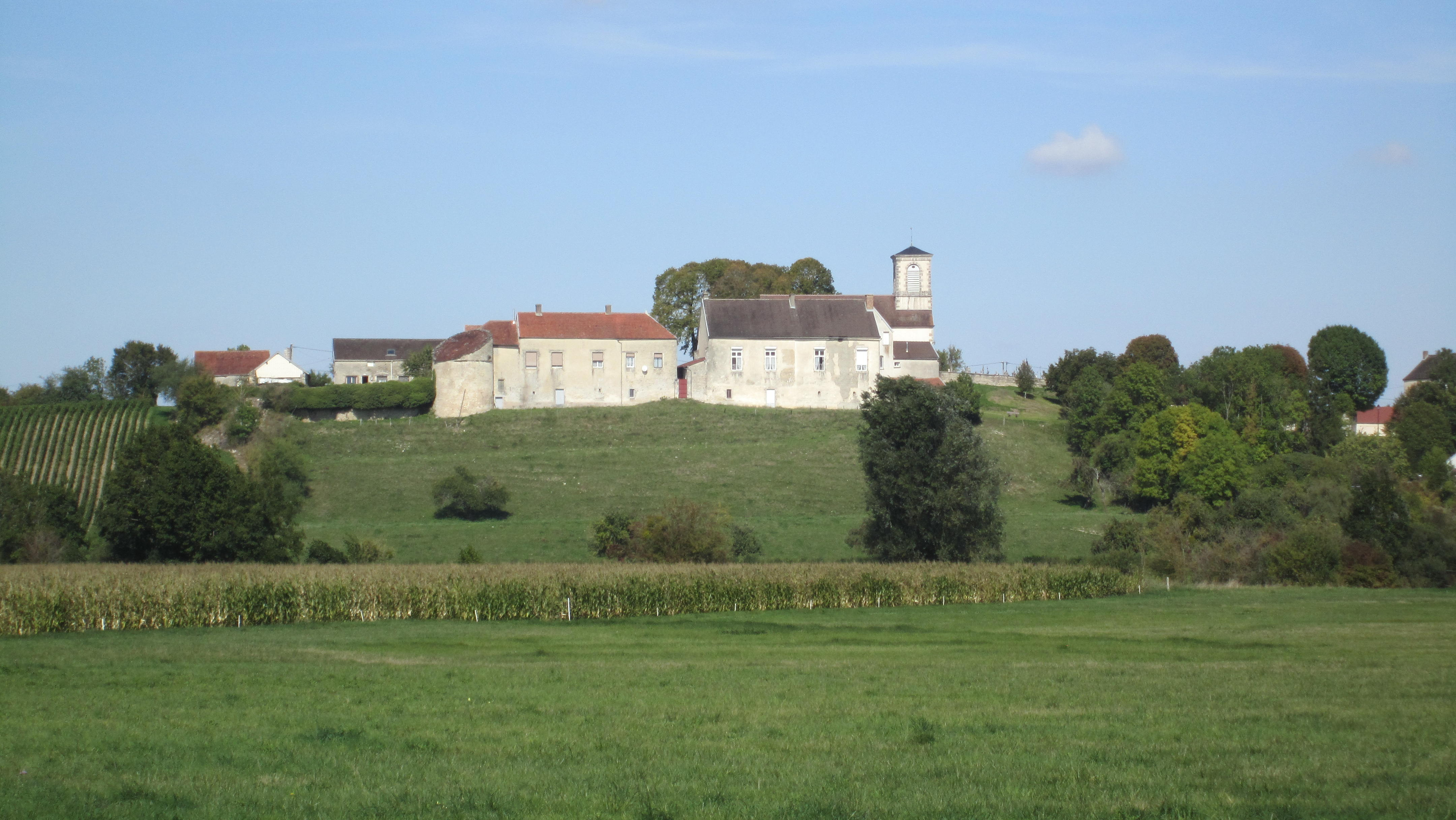 Villedieu (Côte-d'Or)